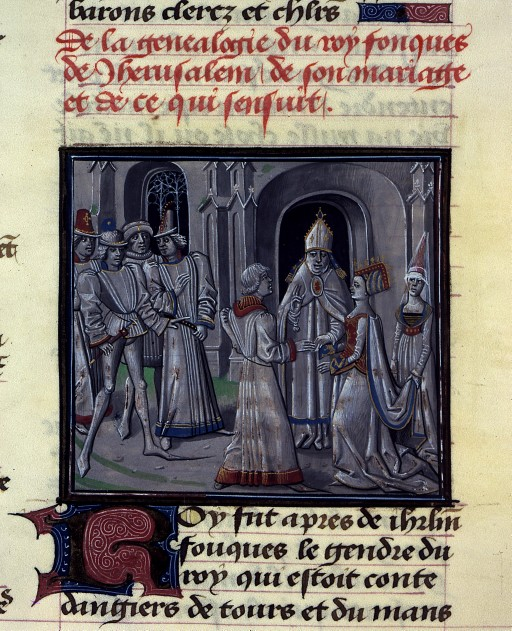 Mariage de Foulque d'Anjou et de Mélisende